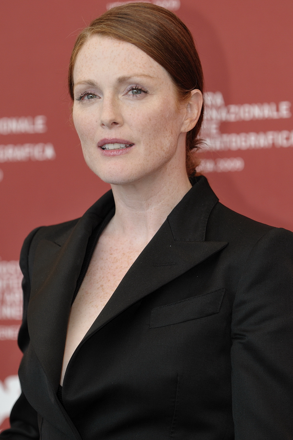 66ème Festival du Cinéma de Venise (Mostra), 10ème jour (11/09/2009) Photocall avec Colin Firth, Julianne Moore, Matthew Goode et le réalisateur Tom Ford pour le film : A sigle Man depicted person: Julianne Moore (age: 48.77)